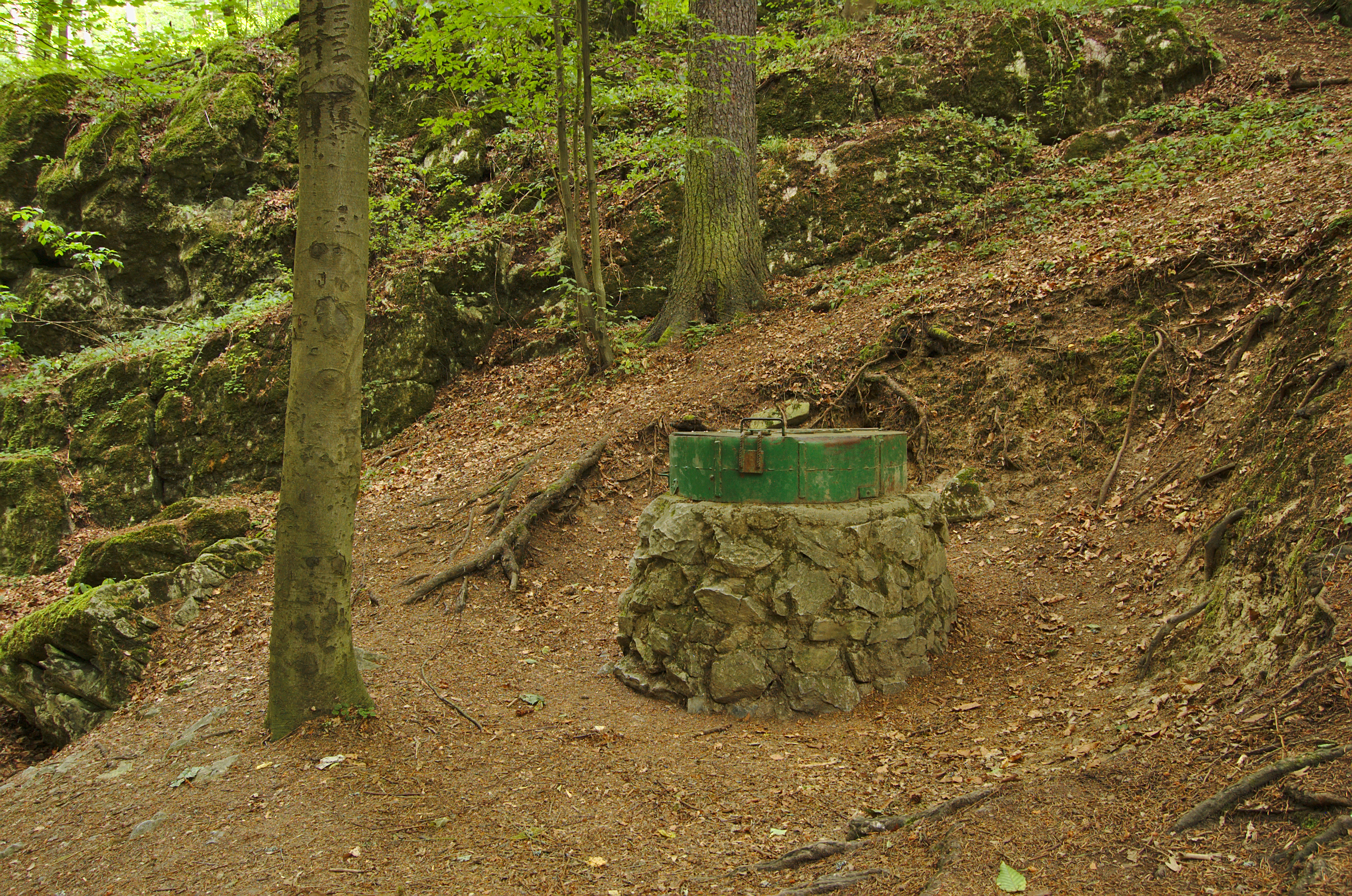 Vchod do jeskyně Piková dáma - poklop, Holštejn, okres Blansko